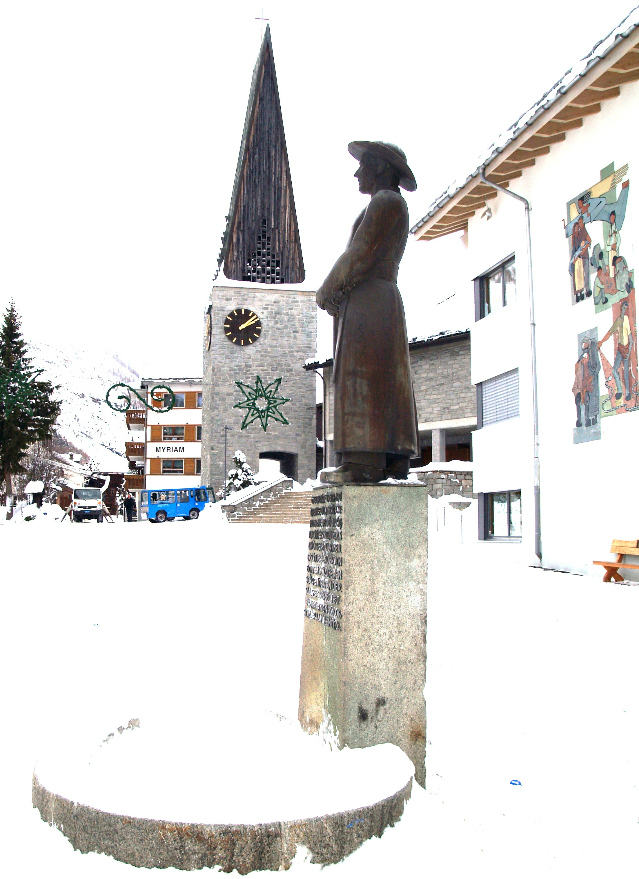 Denkmal für Johann Josef Imseng, im Dorfkern von Saas-Fee, aufgenommen im Dezember 2012